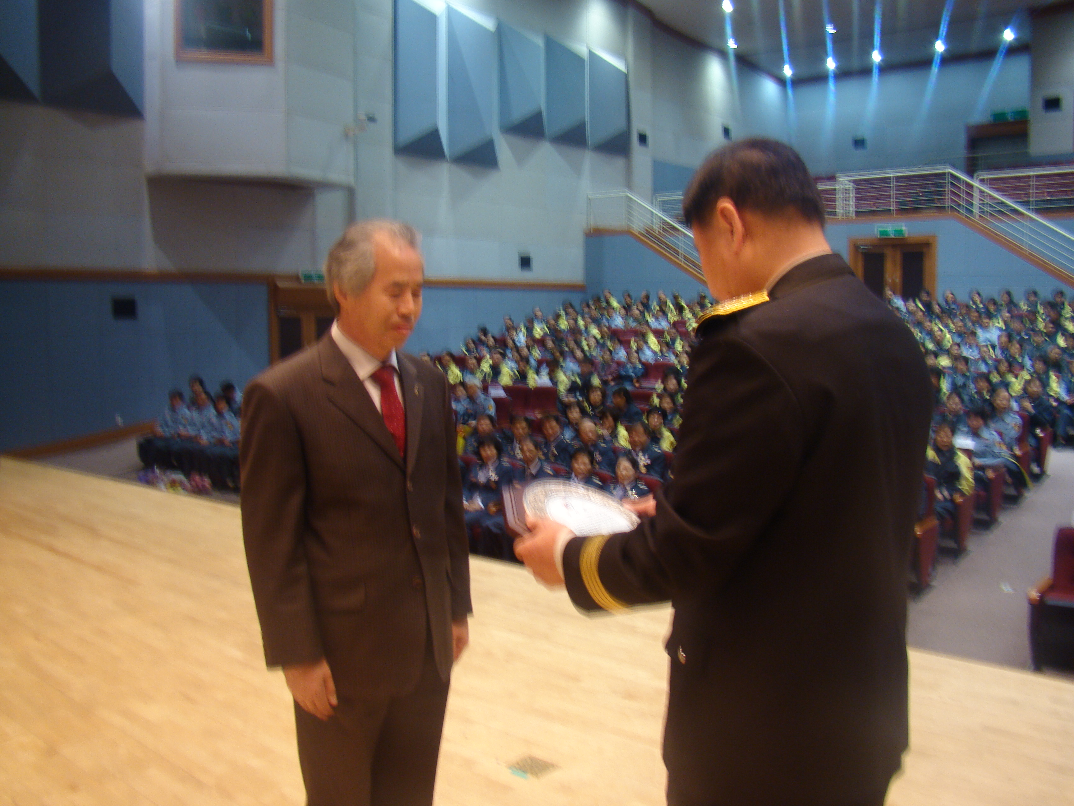 2011년 3월 15일 강원대 차장섭 교수 강릉소방서 의용소방대 강연(강릉의 문화예술과 신사임당의 재발견)